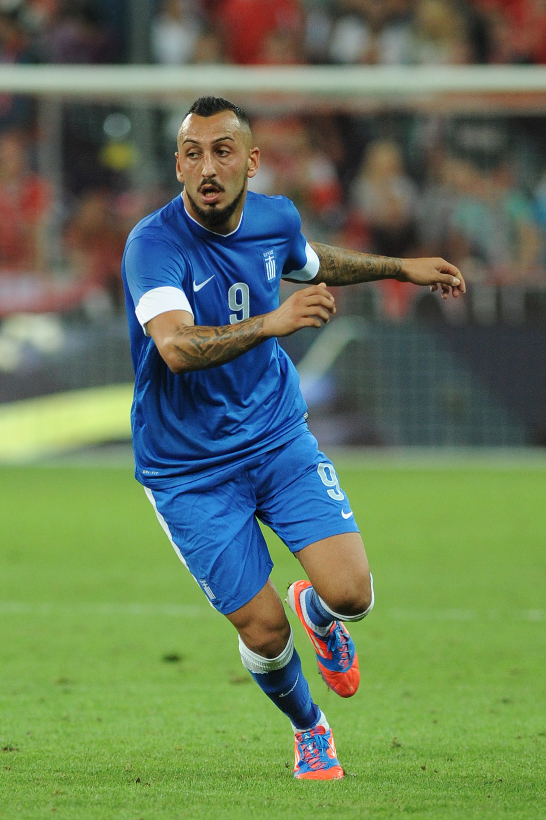 Freundschaftliches Länderspiel Österreich - Griechenland am 14. August 2013 in Salzburg: Kostas Mitroglou